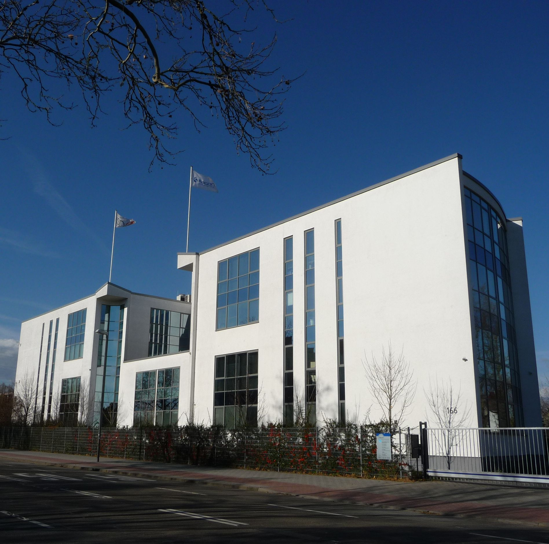 Rogon Sportmanagement, Ludwigshafen-Friesenheim